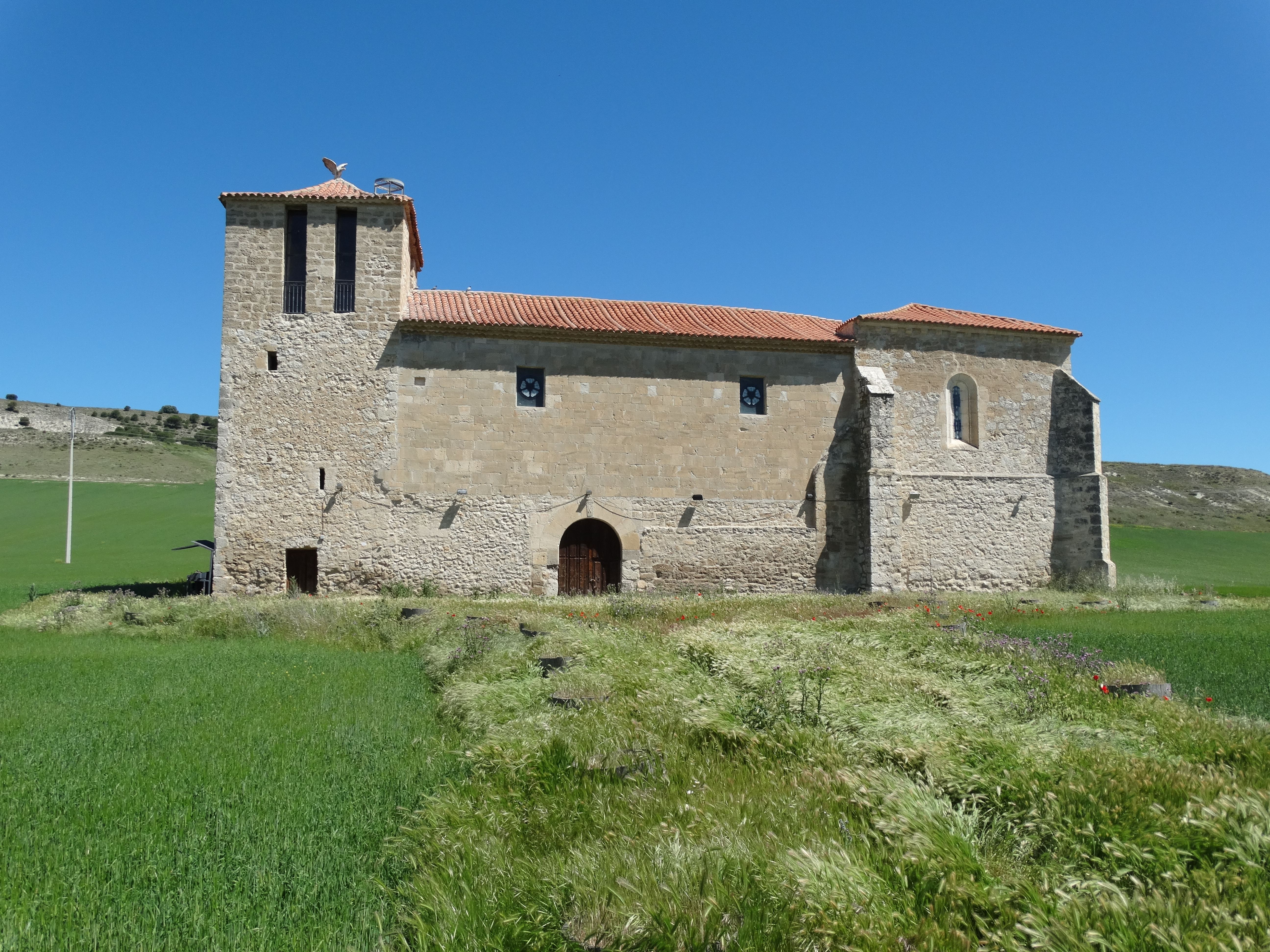 Despoblado de Peñalba de Duero en el término de Villabáñez, Valladolid, España. Fachada sur de la iglesia restaurada.